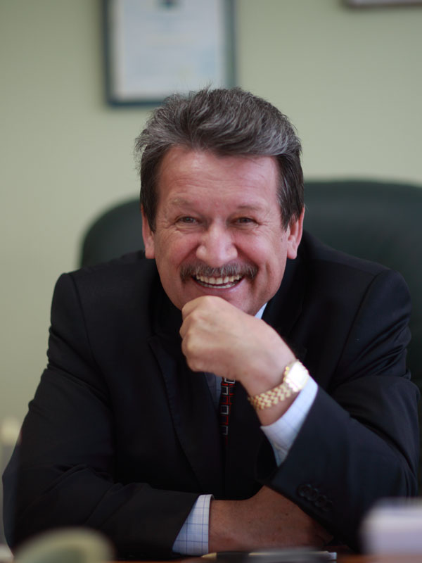 Генеральный директор ООО НПП "ЗСТ"